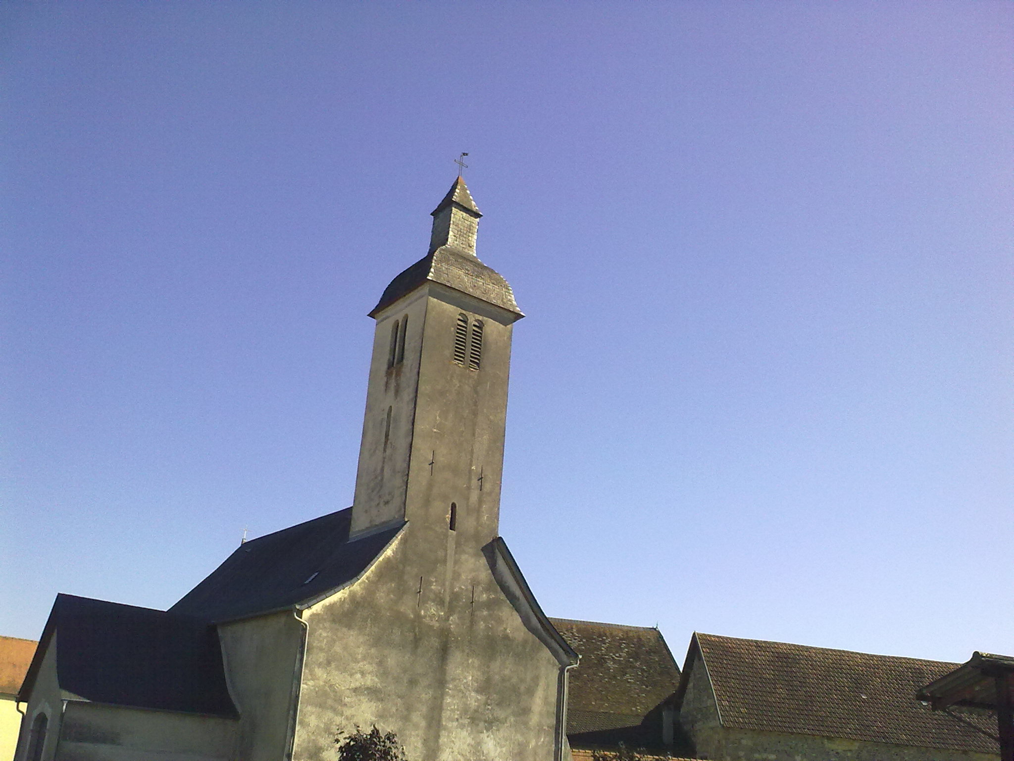 Bastanès le 18 juillet 2010, France.